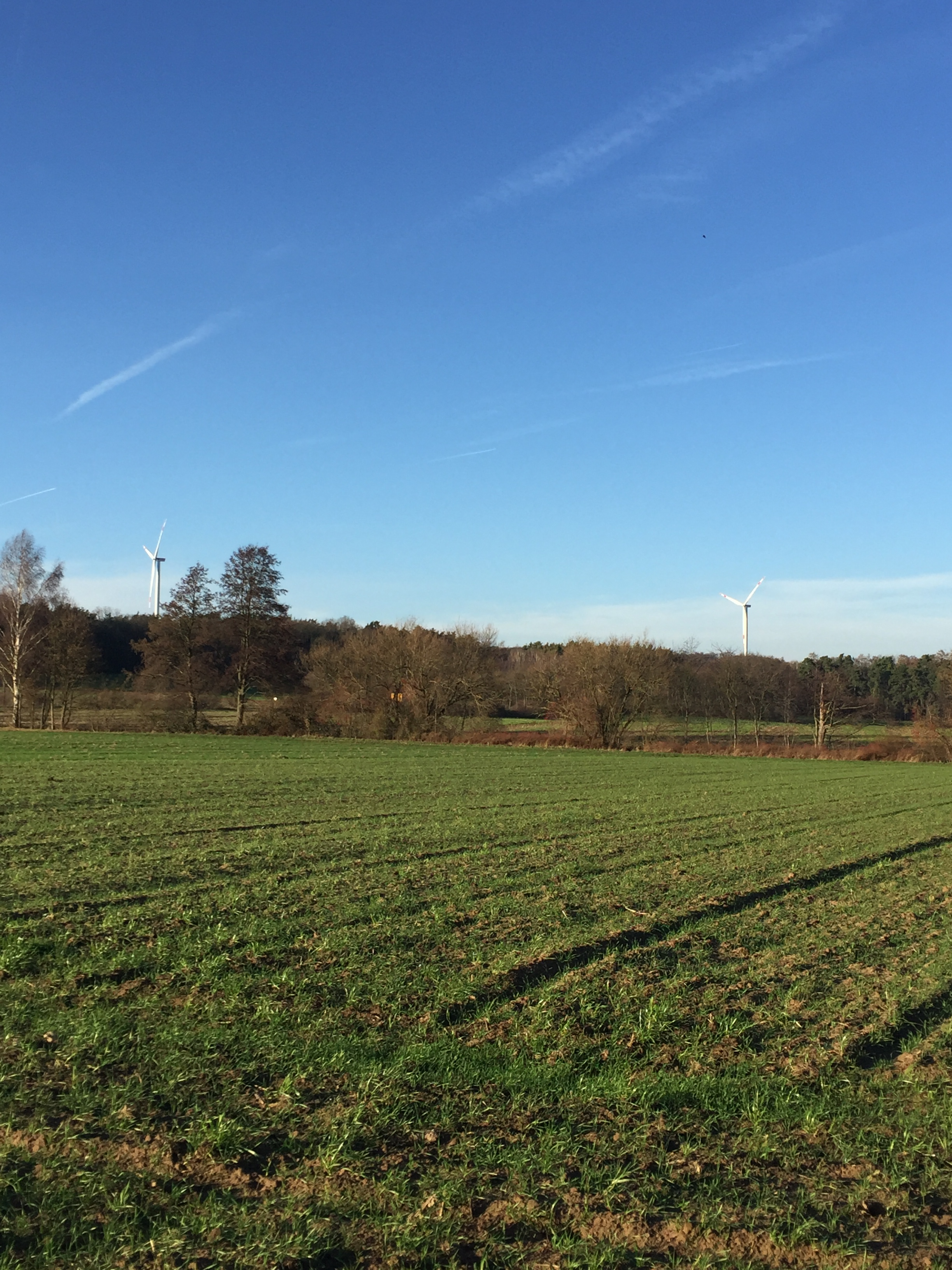 Windkraftanlagen auf dem Tannenkopf nahe Roßdorf